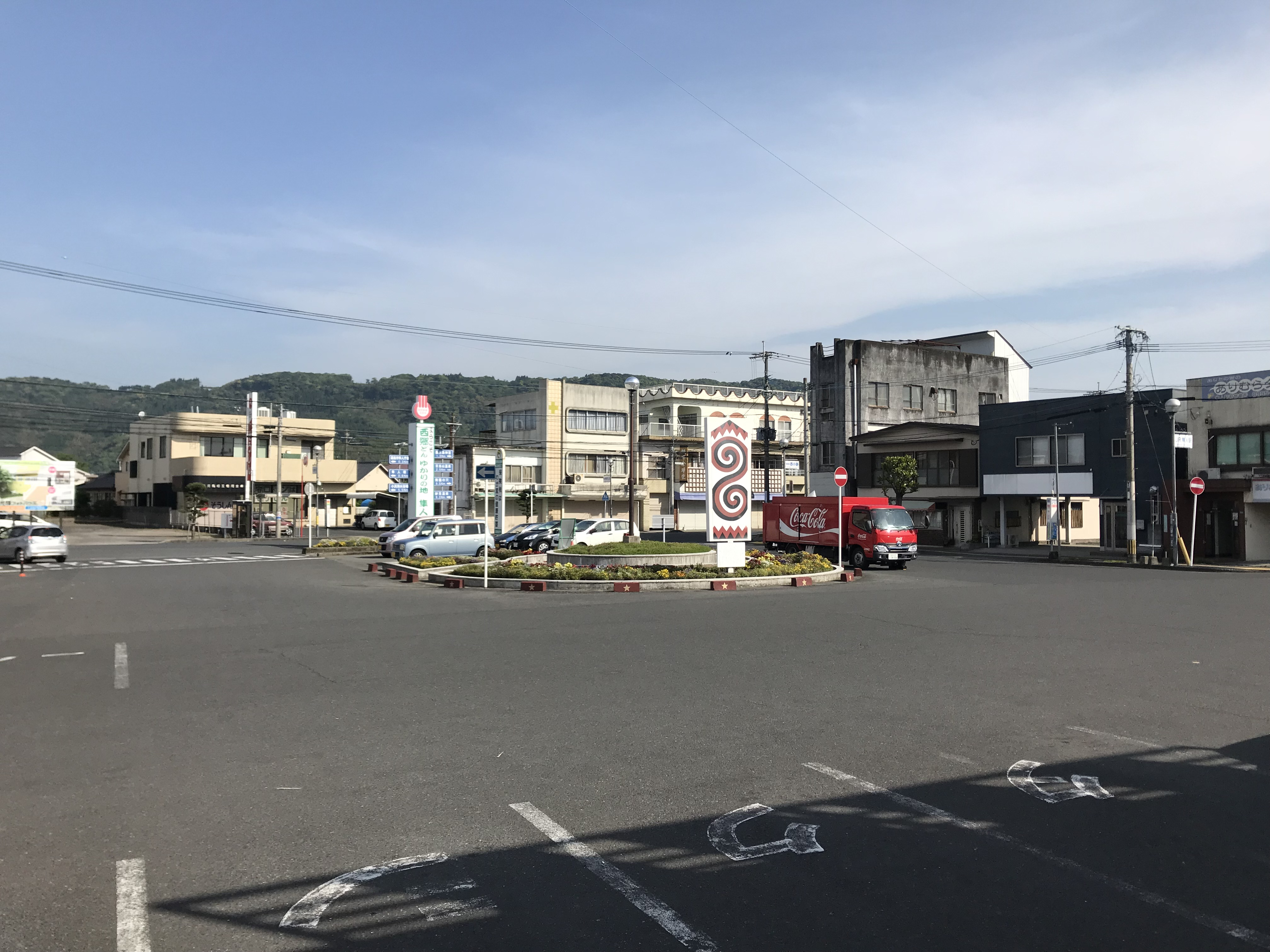 隼人駅前の様子